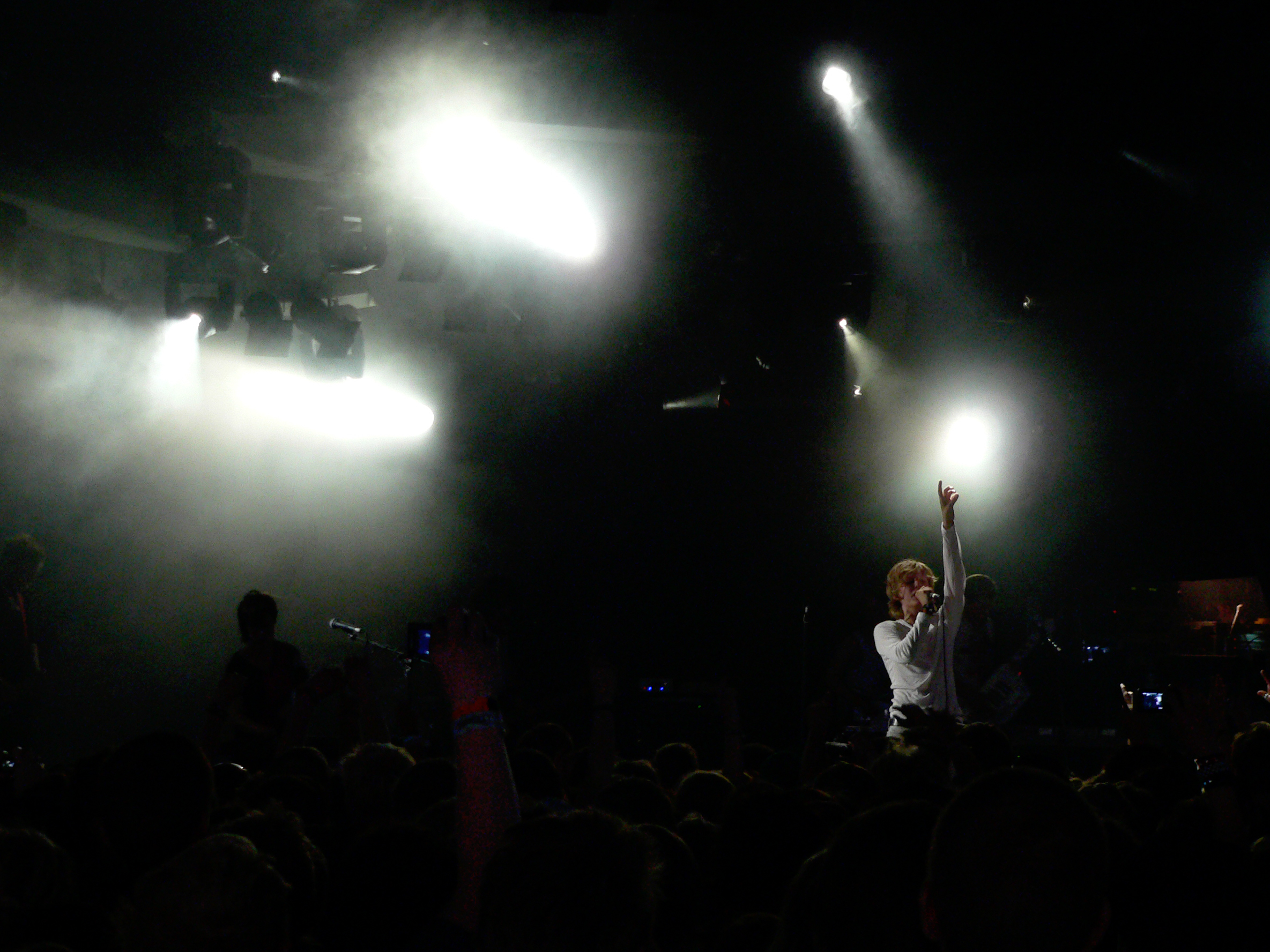 Dúné at Roskilde Festival 2007